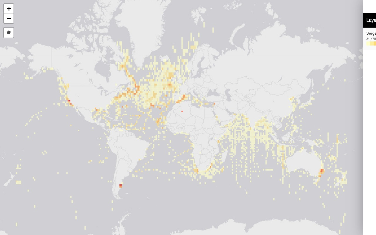 Distribuição mundial da família Sergestidae, superfamília Sergestoidea, retirado de OBIS